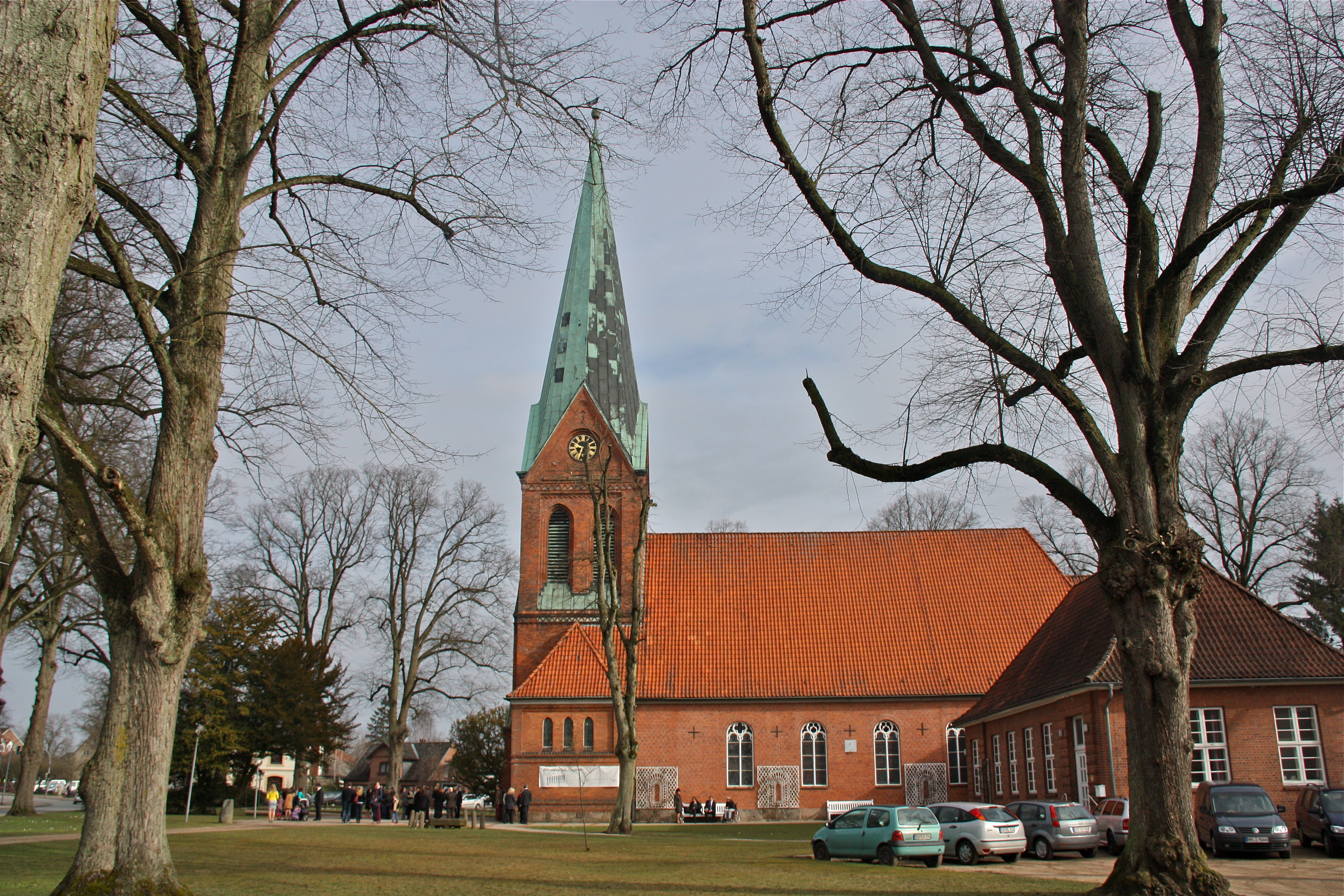 Trittau, Martin-Luther-Kirche, Ansicht von Süden